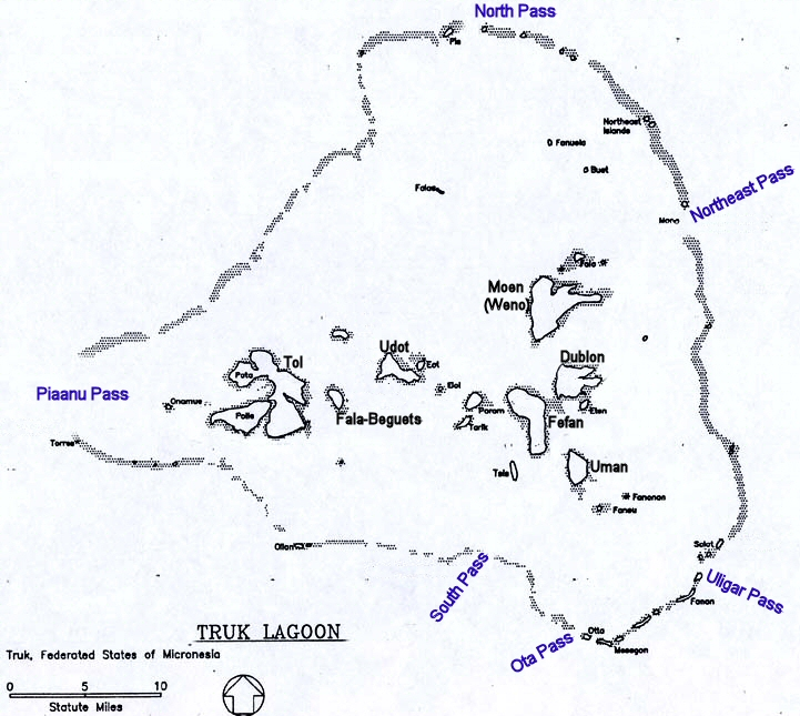 Map of Truk lagoon.